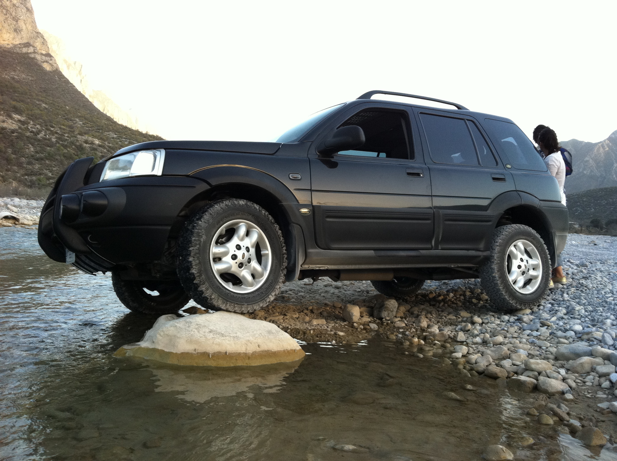 Un Land Rover Freelander 2002.